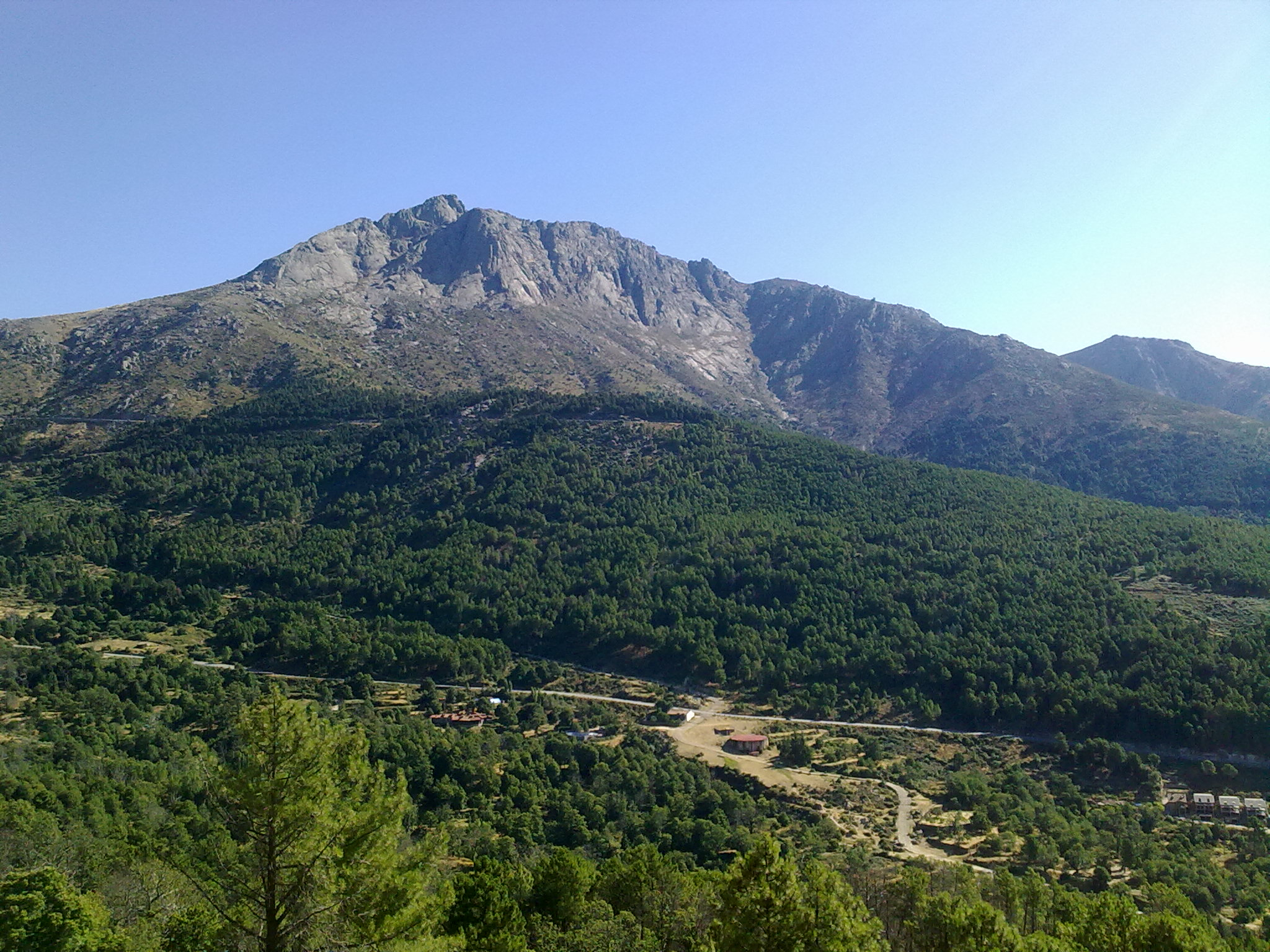 Vista del Torozo